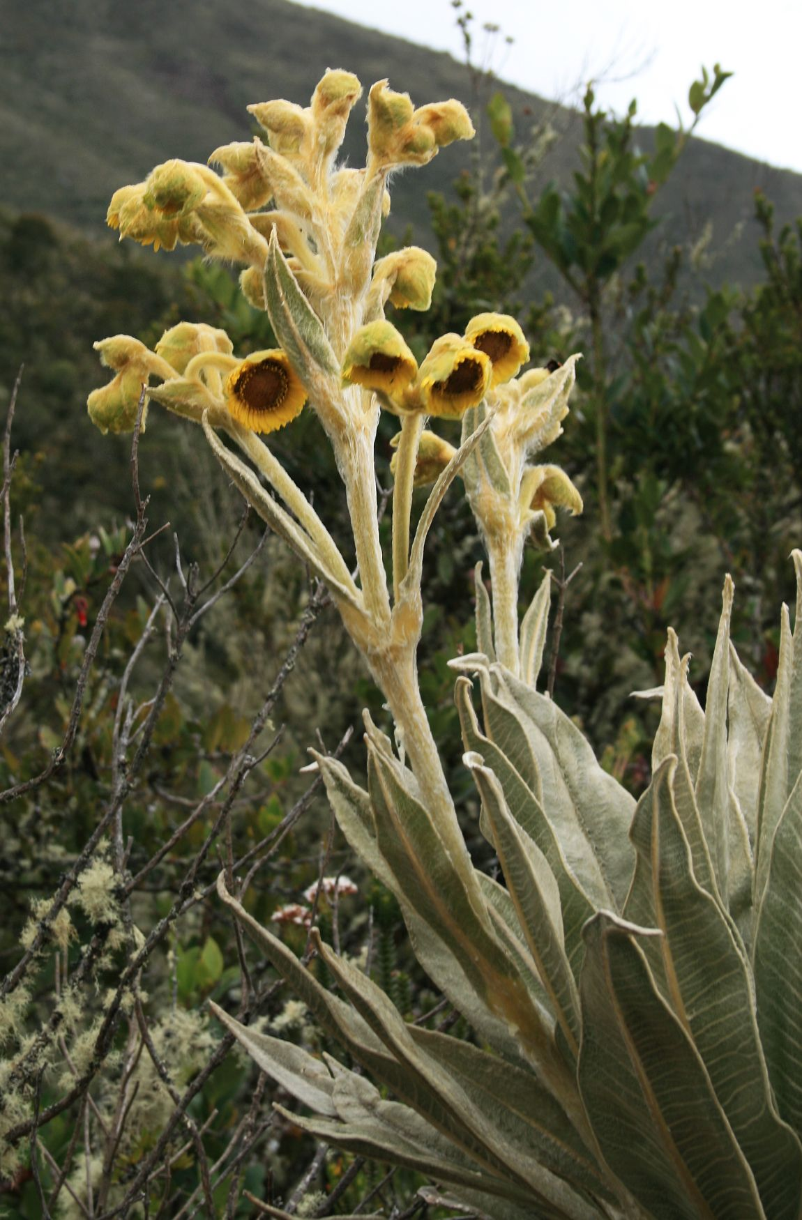 Espeletia grandiflora subsp. grandiflora, Korbblütler (Asteraceae) – Kolumbien/Colombia: Dpto. Cundinamarca, Parque Nacional Natural Chingaza, Sendero Lagunas de Siecha, ca. 11–12 km SSE Guasca, ca. 3450 m